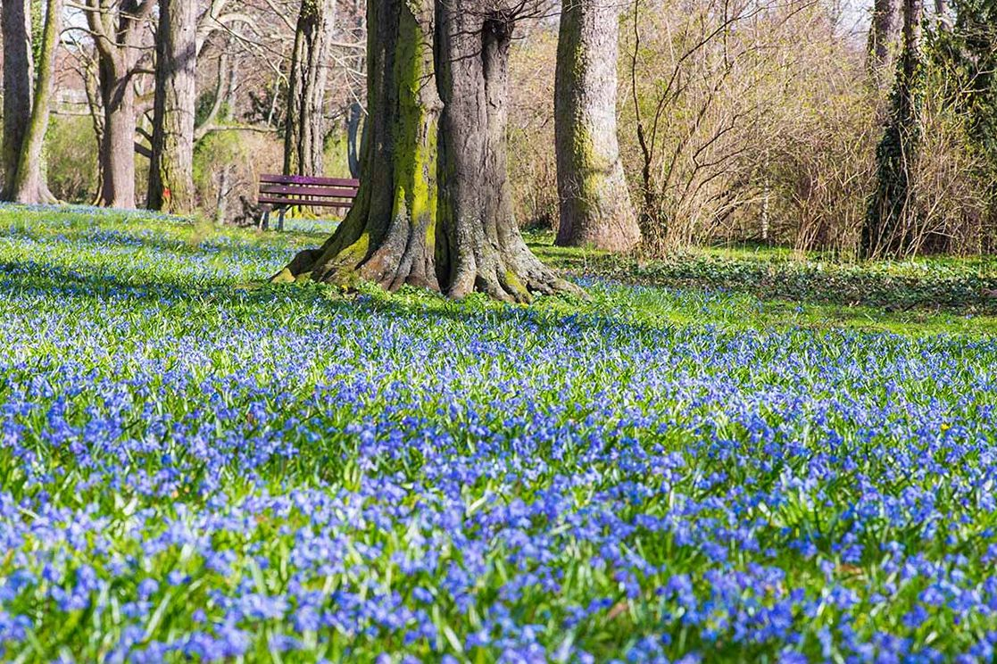 Blausterne im Nordpark von Magdeburg